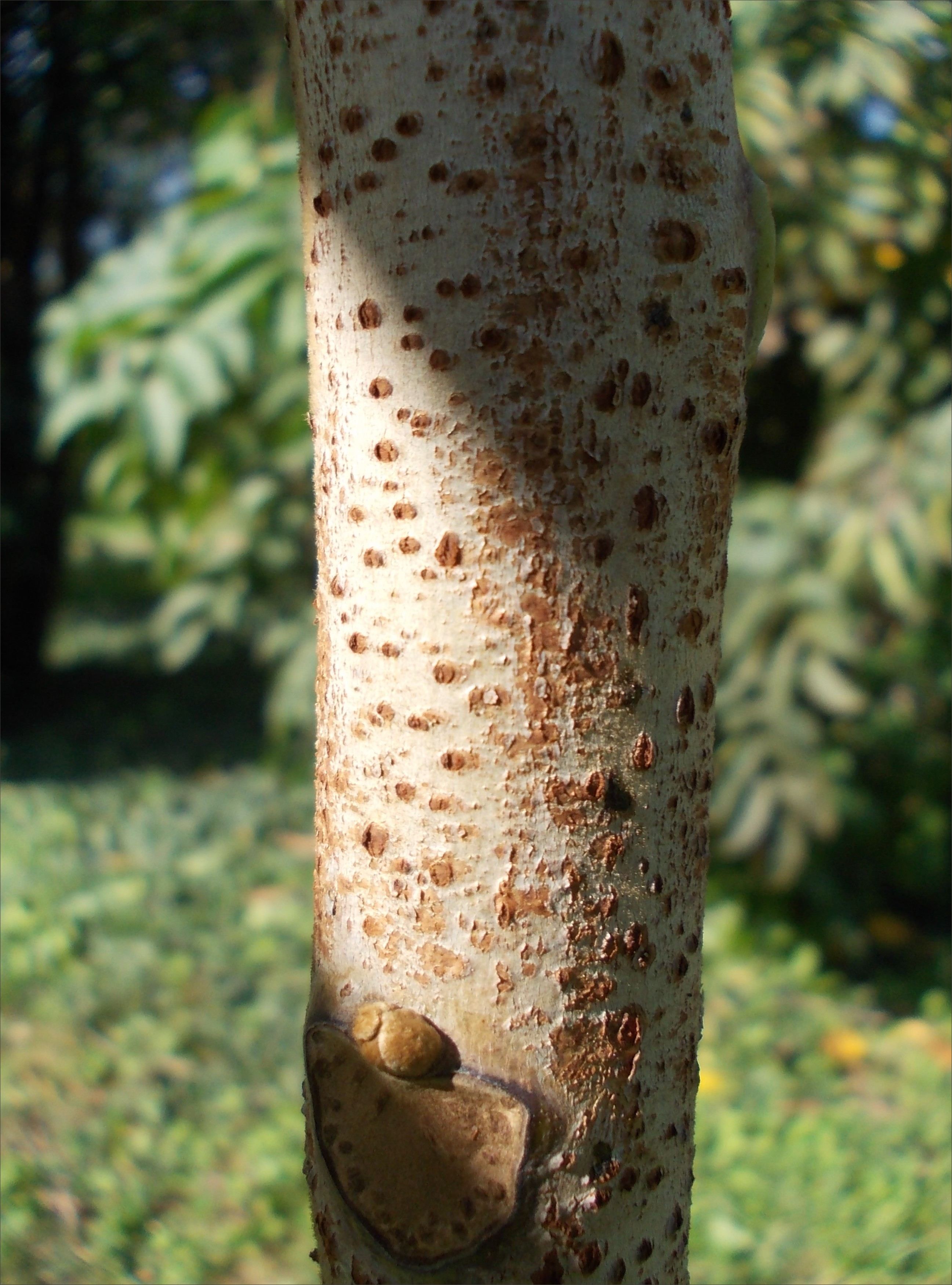 Lakkszömörce (Rhus verniciflua) kérge